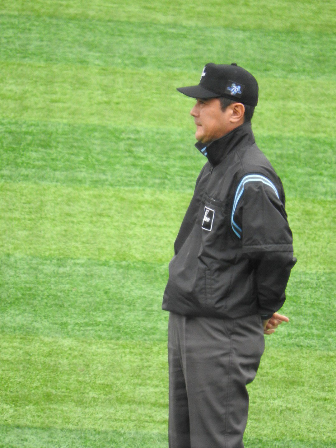 2019年6月9日横浜スタジアムにて